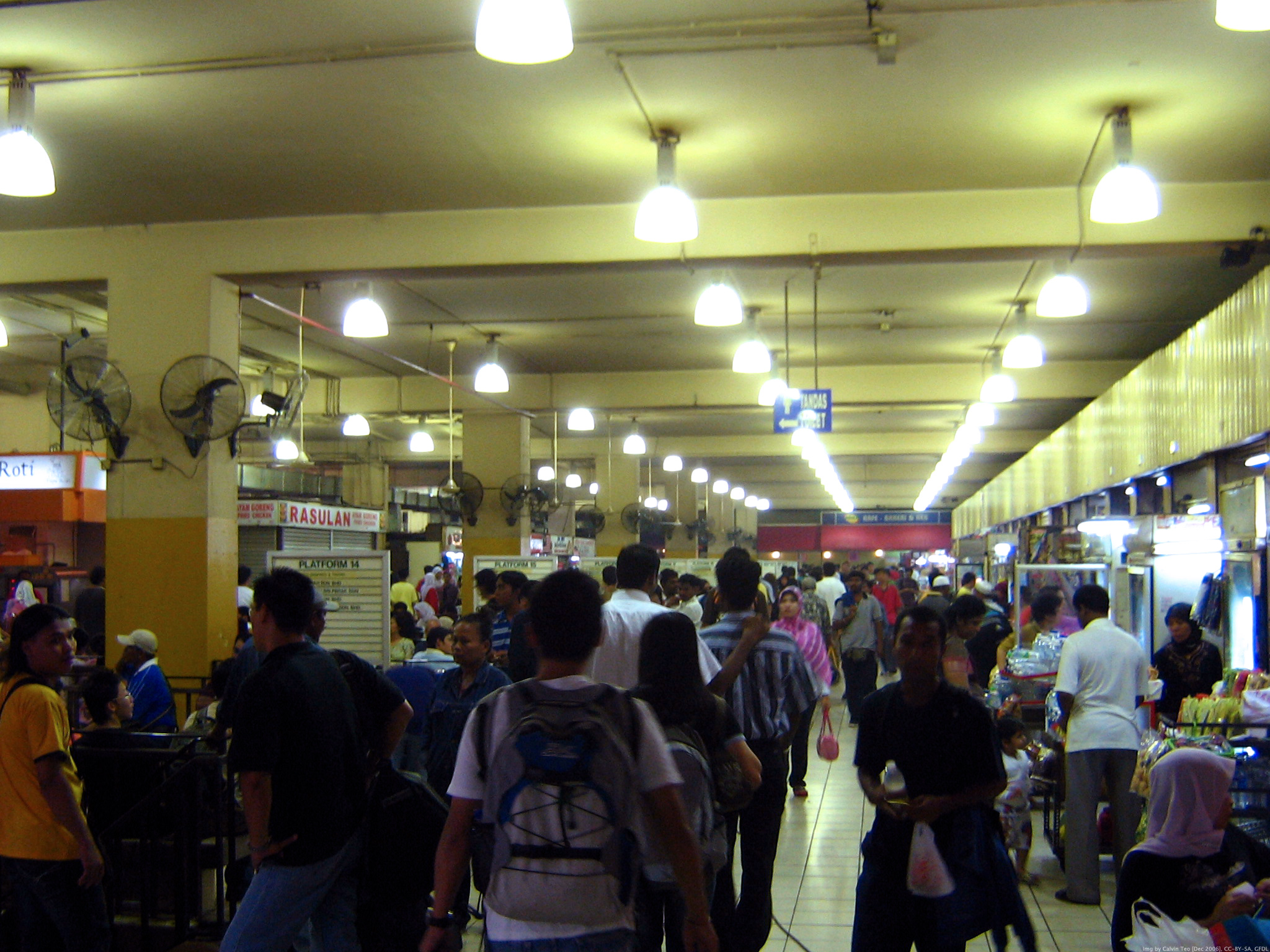 Puduraya Bus Terminal, Kuala Lumpur, Malaysia